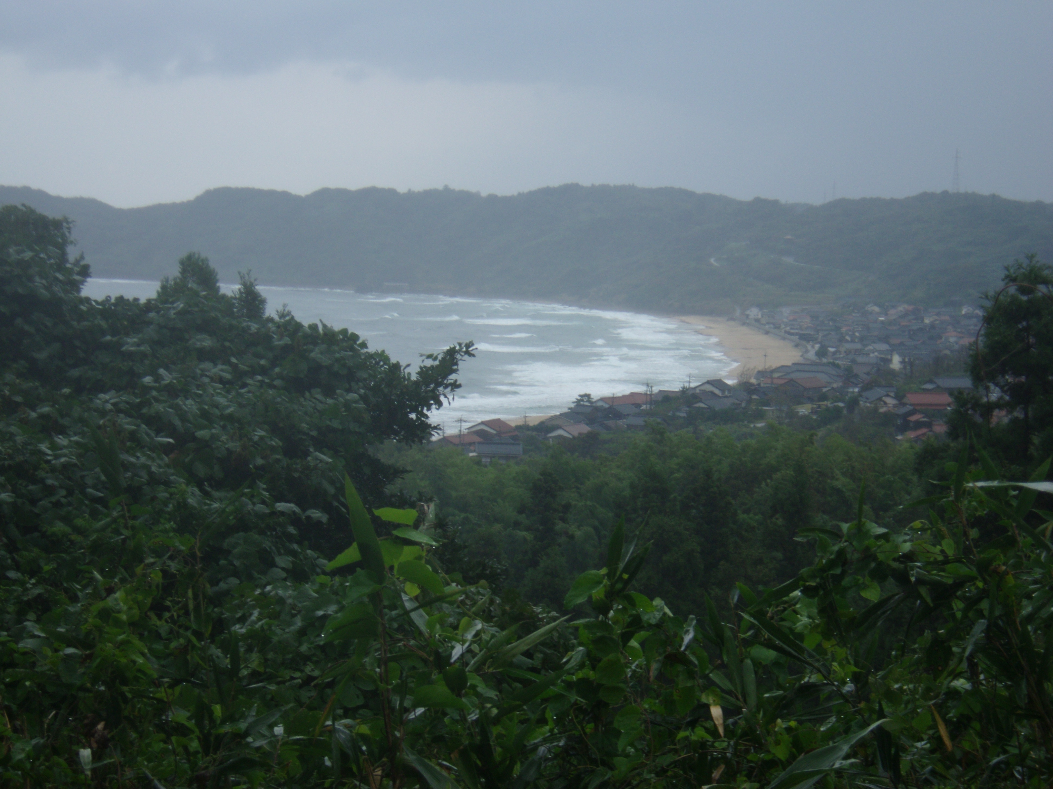 世界遺産「石見銀山」の構成資産である銀山街道鞆ヶ浦道 鳴き砂で有名な琴ヶ浜が見えればゴール間近